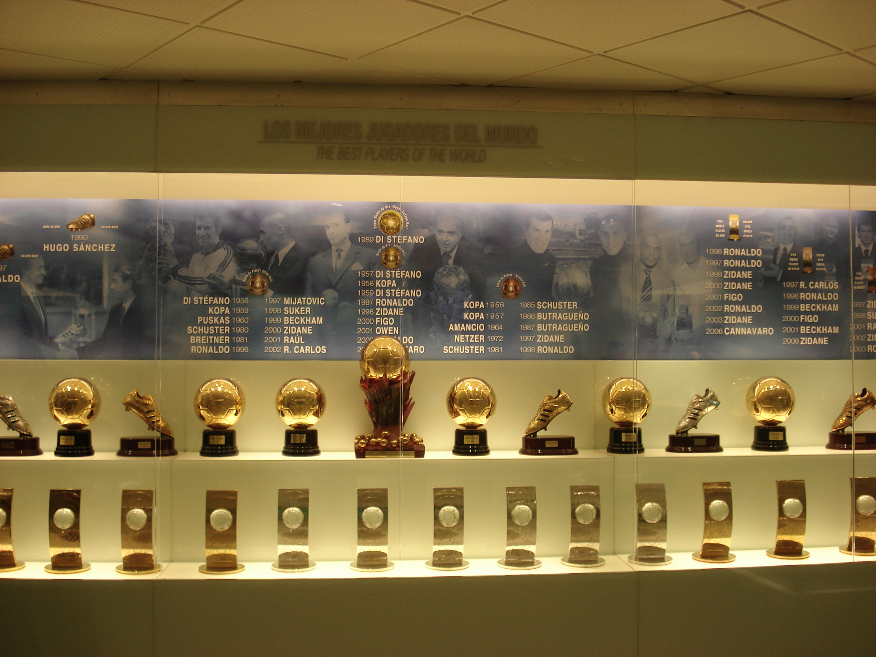 Balónes de Oro at Real Madrid Museum